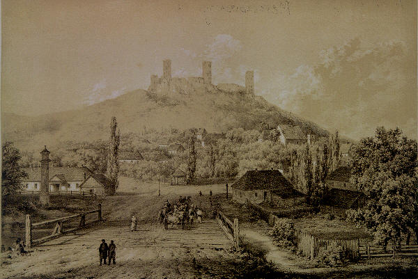 Chęciny. Ryc. 214 z Serii VII. ALBUM WIDOKÓW PRZEDSTAWIAJĄCYCH MIEJSCA HISTORYCZNE KRÓLESTWA GALICJI I ZIEM KRAKOWSKICH ZRYSOWANE Z NATURY PRZEZ ... LITOGRAFIA W ZAKŁADZIE LITOGRAFICZNO-ARTYSTYCZNYM MAXYMILIANA FAJANSA W WARSZAWIE. SKŁAD GŁÓWNY U AUTORA W PIŃSKU - GUBERNIA MIŃSKA.; 1875 - 1883, litografie A. Gr.: 116 / 1 - 260 Dwa vol. D. sygn. druków - 314.827 II Proweniencja: dawna własność biblioteki zamku w Suchej; w ZNIO od 1950 (Akc. 6367 - D - 50) pierwotnie w zbiorach magazynu książek, następnie w Gabinecie Grafiki (początkowo jako I.g.: 393).